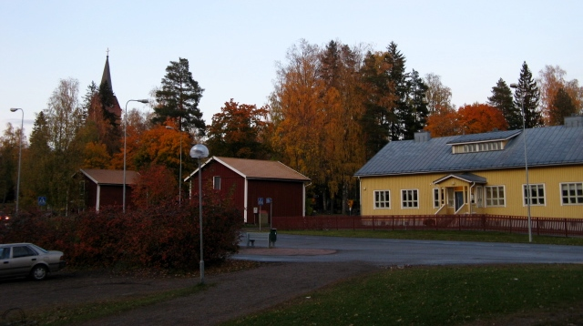 Mäntsälän kirkonmäki. Edessä vanha Yhteiskoulu ja Kirvun pitäjän museo ja taustalla Mäntsälän kirkko